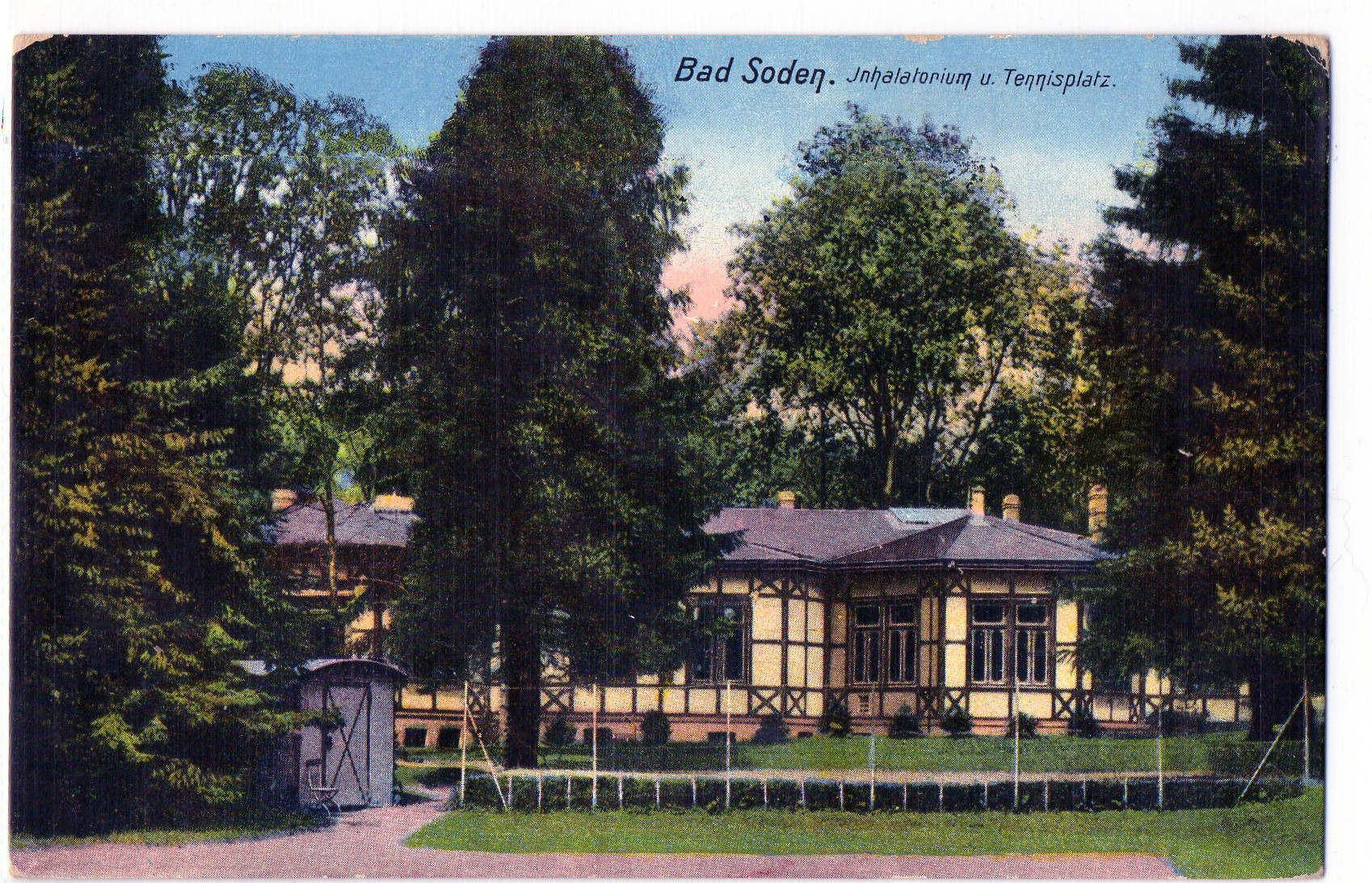 Altes Inhalatorium 1930 im alten Kurpark